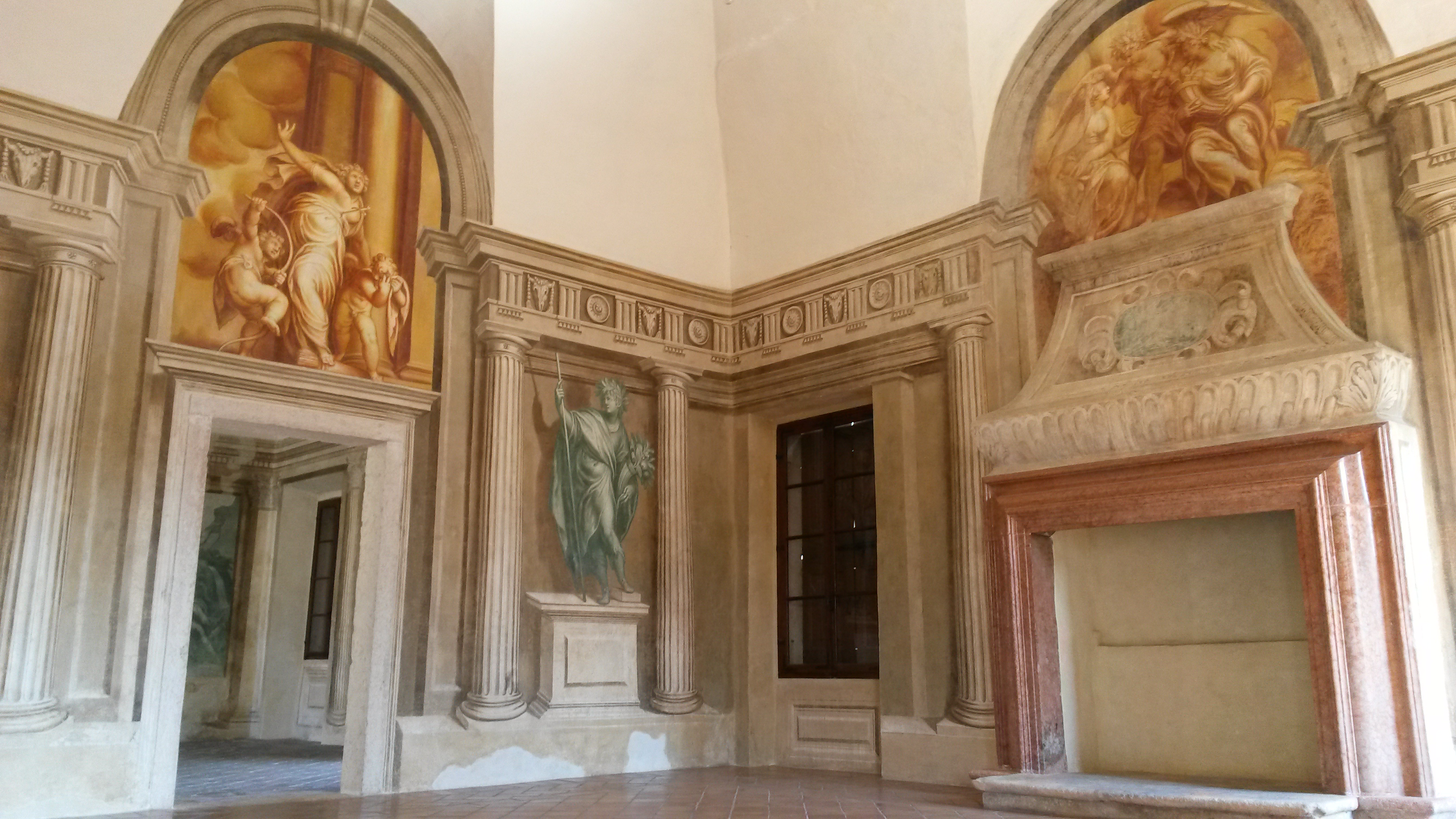 Affreschi di Paolo Farinati, 1590 circa (restaurati nel 2016): peristilio di ordine dorico e, da sinistra, "Suicidio di Lucrezia", "Allegoria dell'Abbondanza", "Pomona, Estate e Cerere".